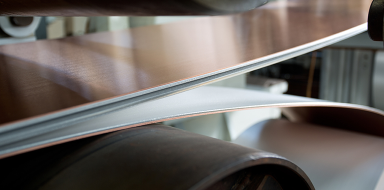 Plattierte Werkstoffe